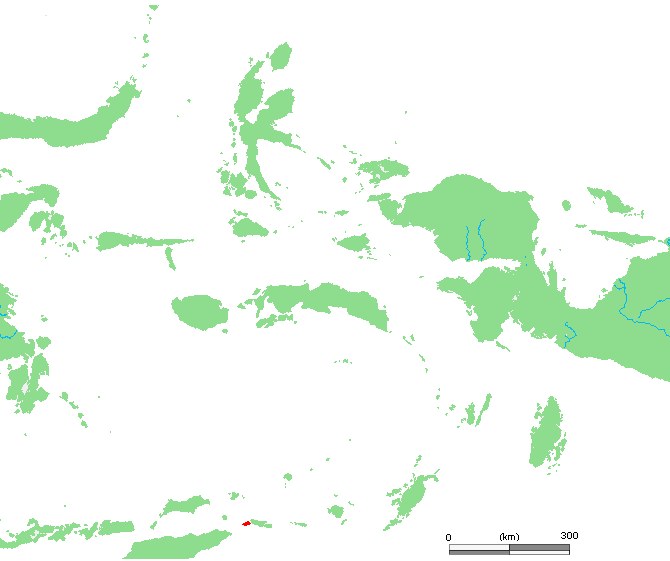 ID Leti